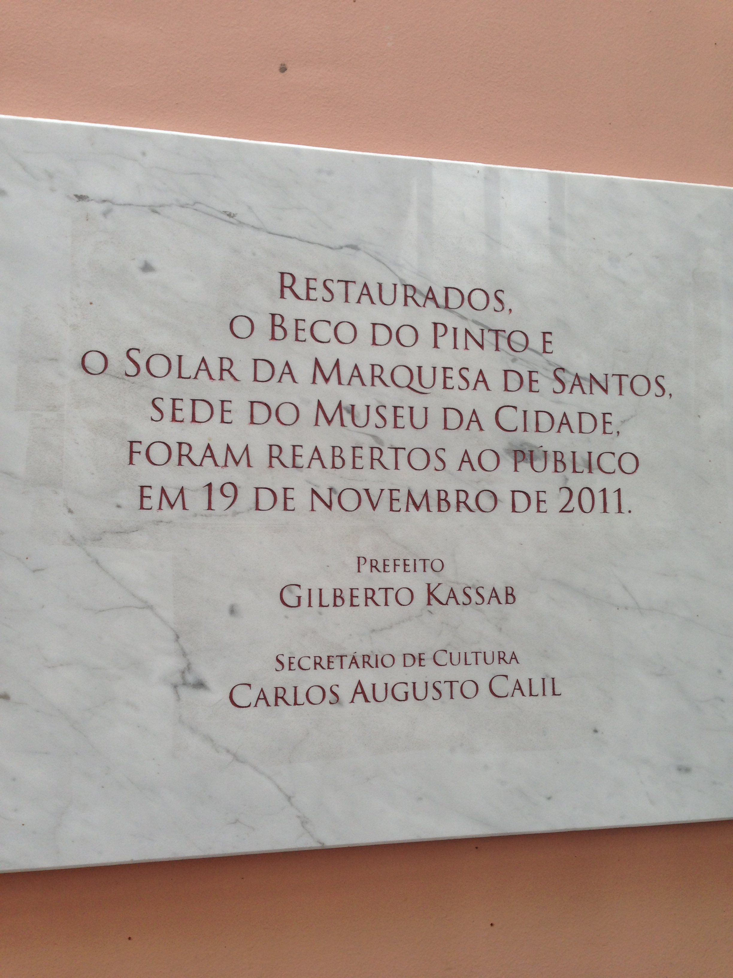 Placa com informações sobre a restauração e reabertura do Solar da Marquesa de Santos e do Beco do Pinto